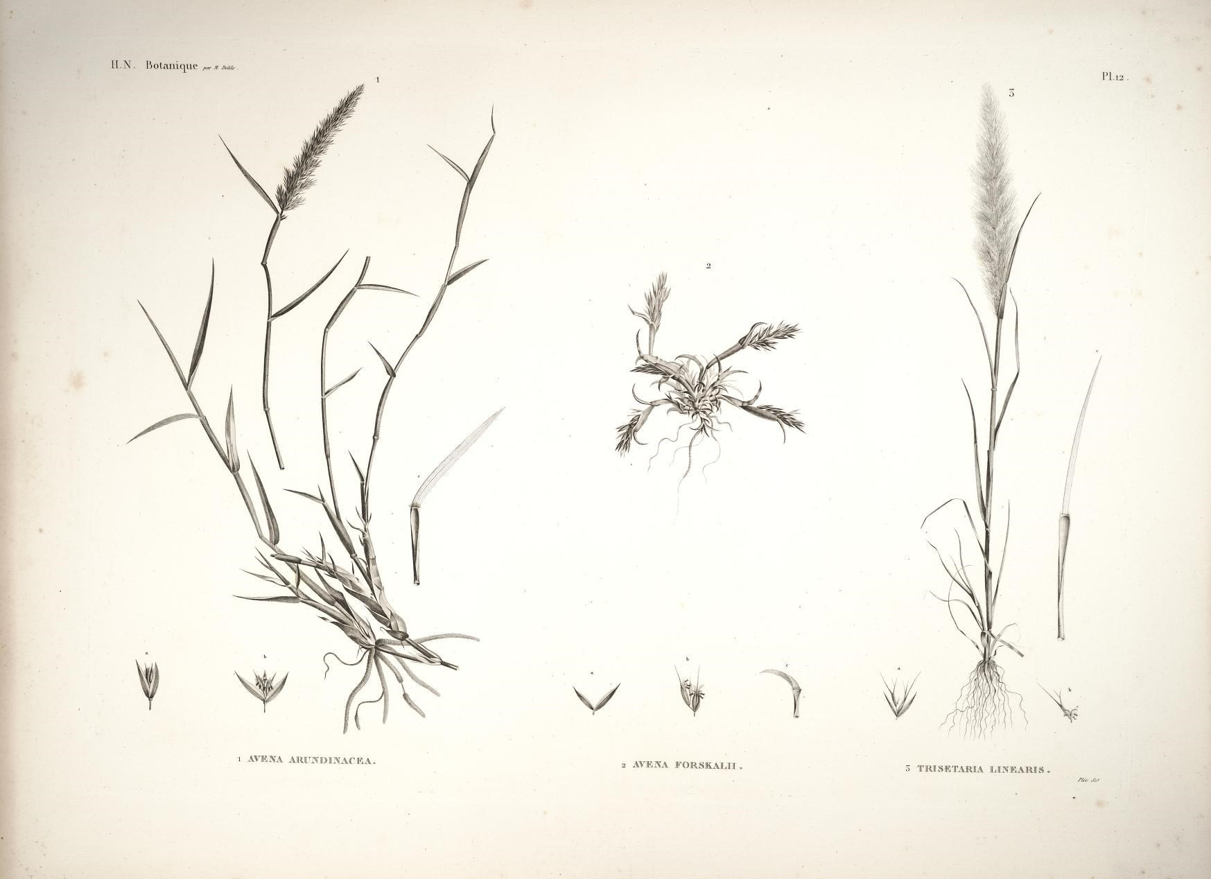 ^_J y - '- /- KN B OtailiCJlie ^..zr JI. J)eà/e/. V ' . H h \ ./ ,. h , I ^, y ^ ~ t ' - -J, / \ ■-. \ / f r / X /■-^ t . -\ v. \ a. r - 3 \ /, l,i iV kBPw: \ ^N ' : \ Im S^ .. ■-w ■^ ■ ' .. '7 \s Py '\ -^ ■^ \.s^ ïi.'i / ( ' &^:^ y ,^v ■. s^ w ^' A SVv .1 ■